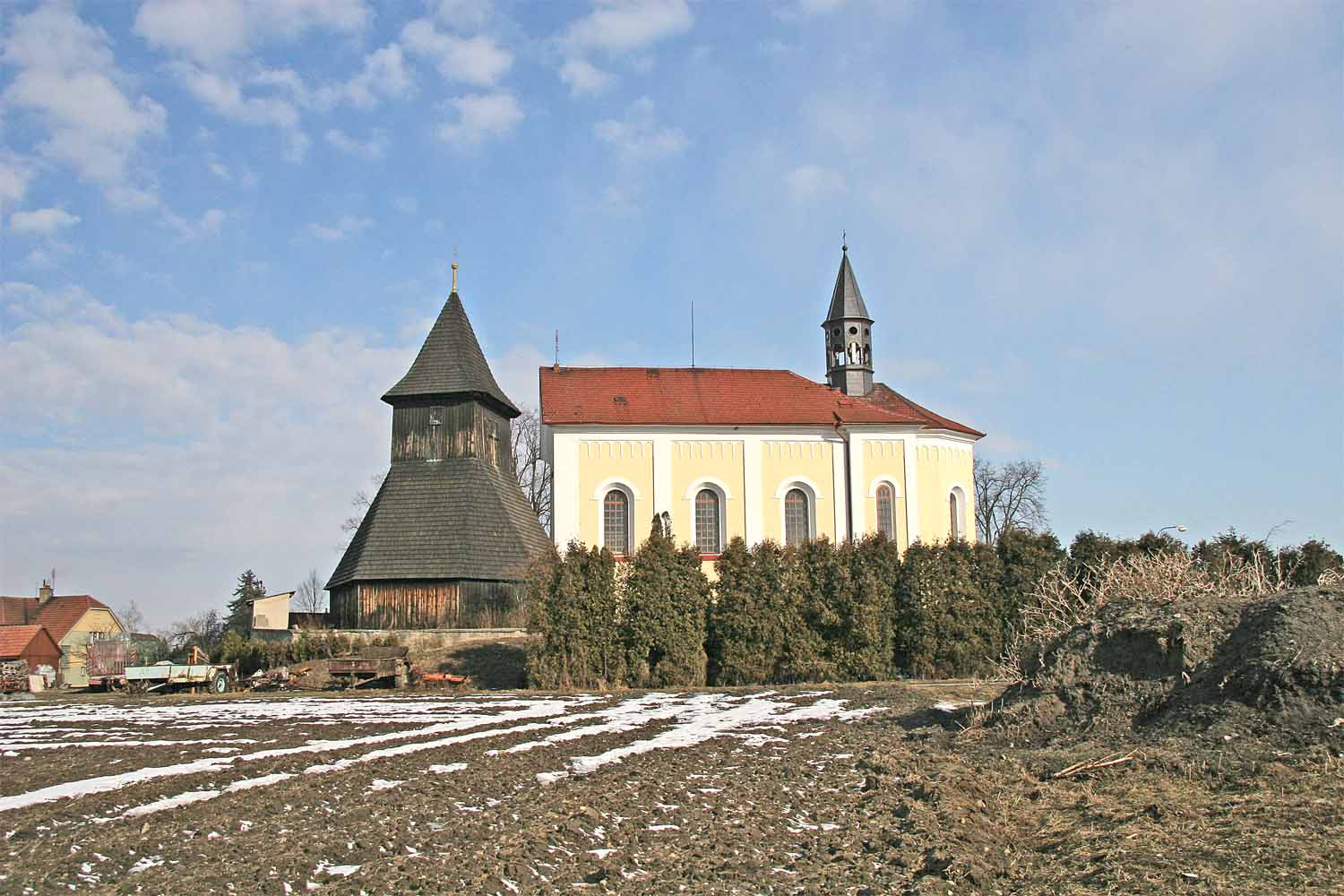 Kostel Sv. Václava s dřevěnou zvonicí v Horních Ředicích